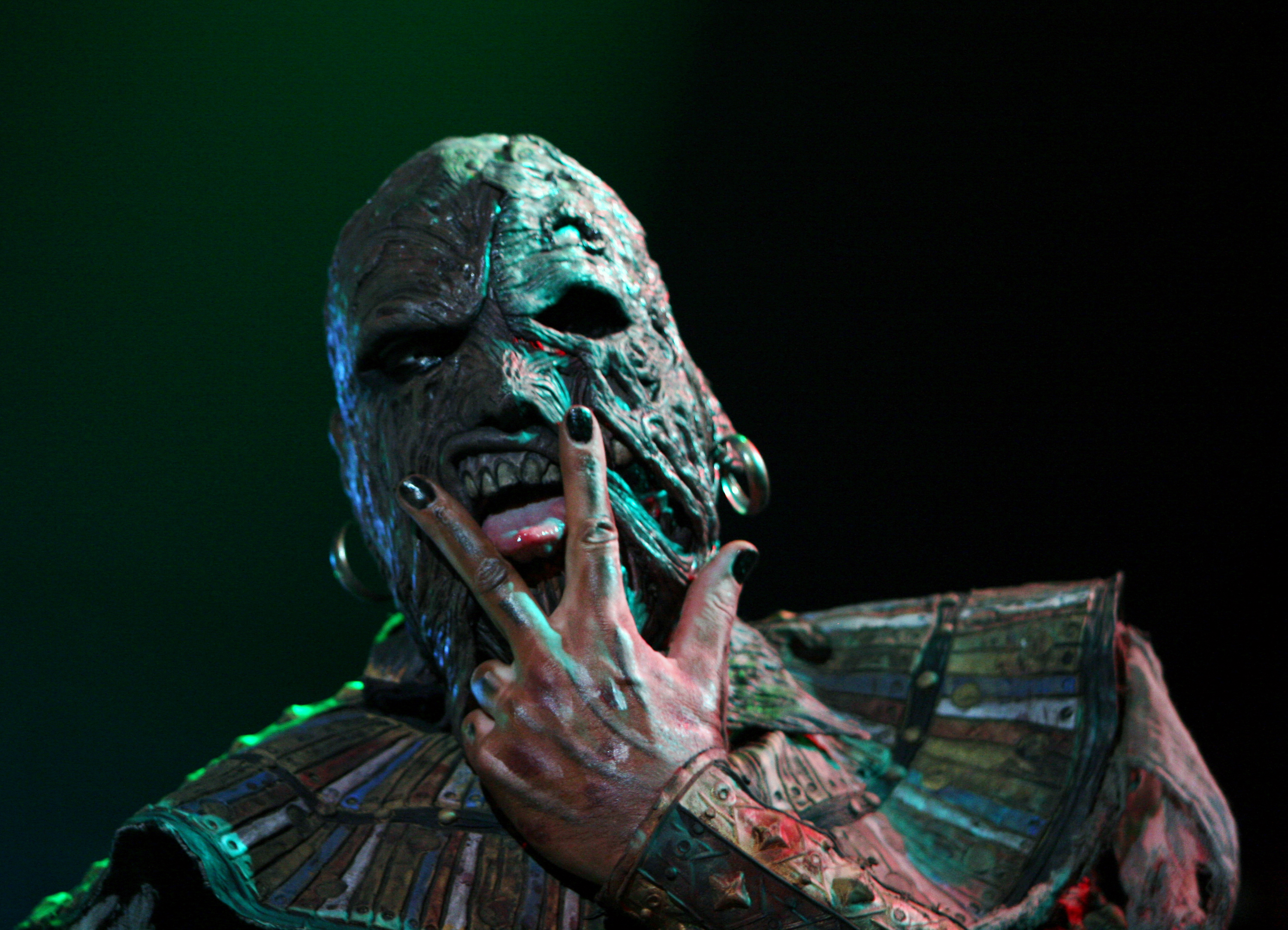 Lordi en la Sala Apolo de Barcelona el 20 de Febrero de 2009